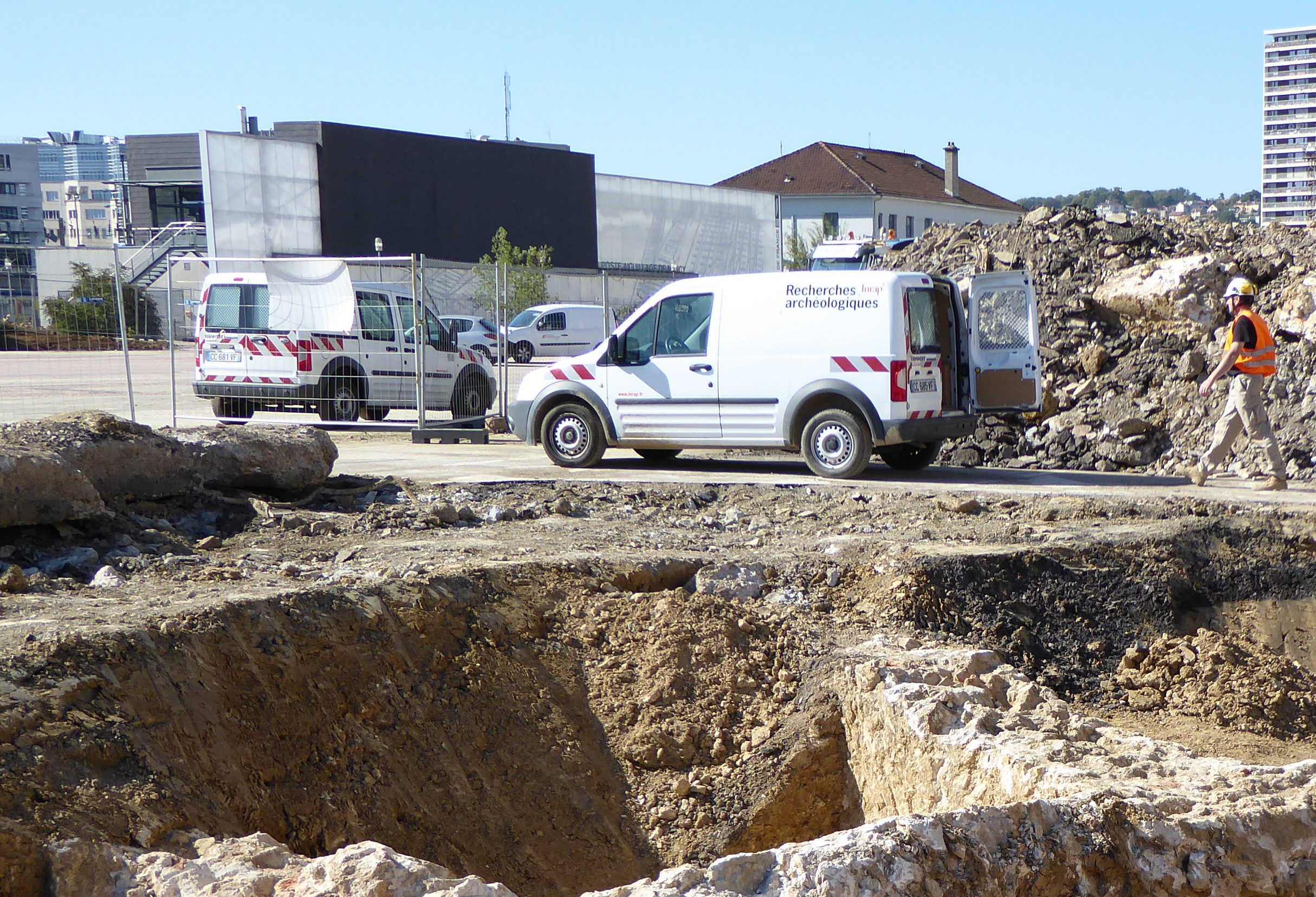 Chantier de fouilles préventives à Nancy sur le site du futur quartier Grand Cœur, boulevard Joffre. Selon l'Inrap, il s'agit d'une partie du bastion de Saurupt, fortification de la ville neuve de Charles III, construite au 17ème siècle.